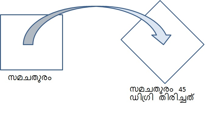 സമചതുരം 45 ഡിഗ്രി തിരിച്ചത്